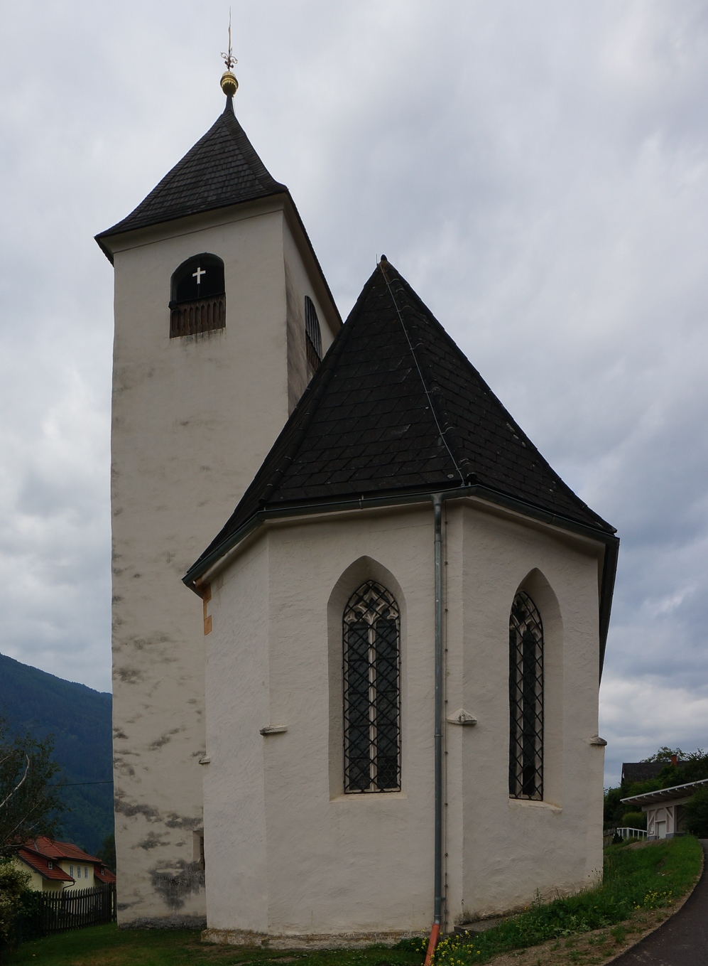 Kath. Filialkirche hl. Andreas - Rappersdorf, Ostansicht in der Gemeinde Mühldorf, Kärnten, Österreich, Europäische Union